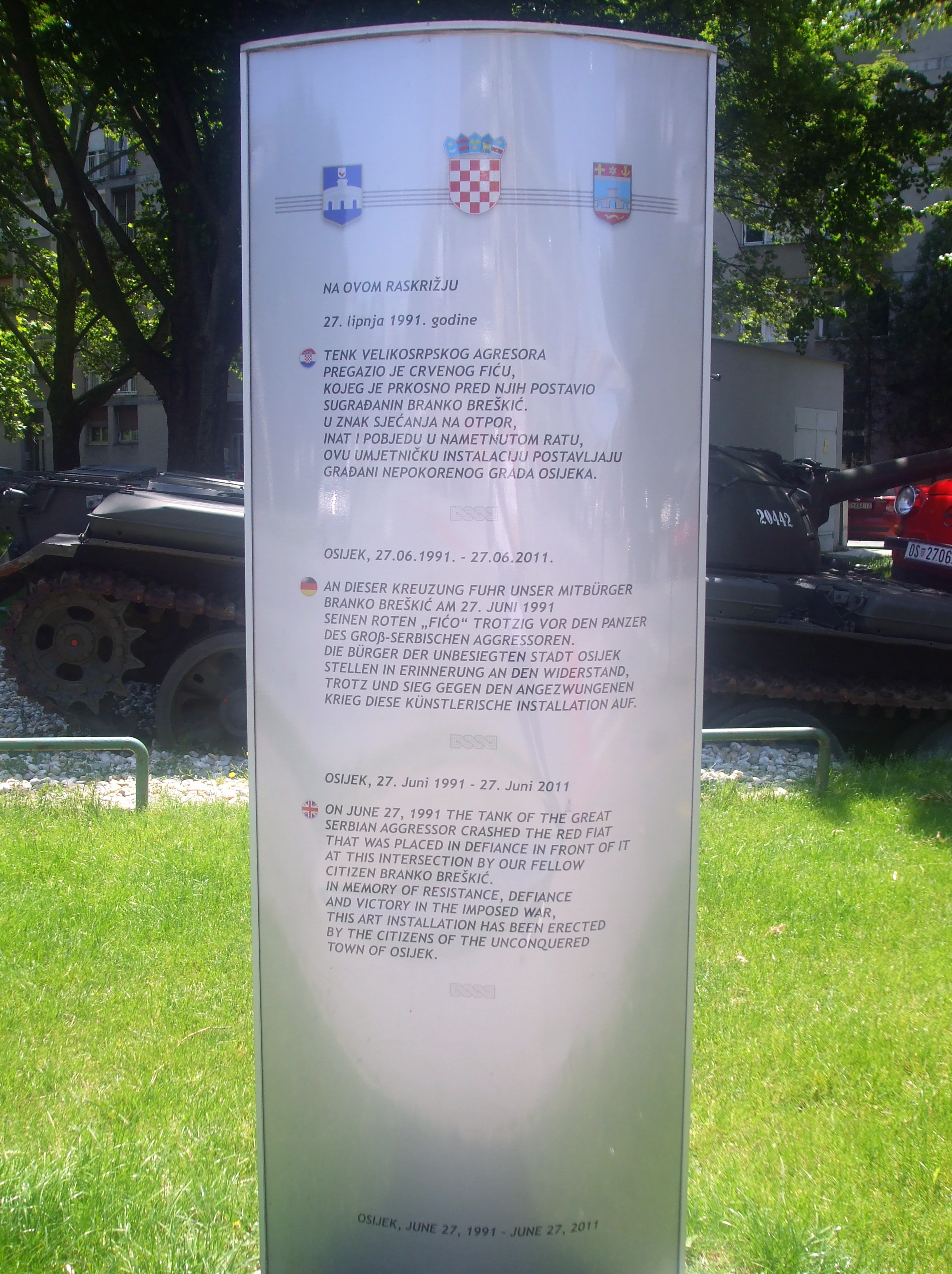 Prateći opis umjetničke instalacije Crvenog fiće i tenka JNA u Osijeku.